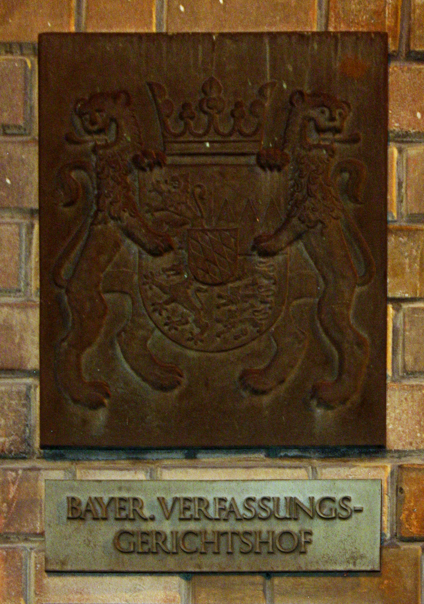 Deutschland, Bayern, München, Bayerischer Verfassungsgerichtshof Infotafel